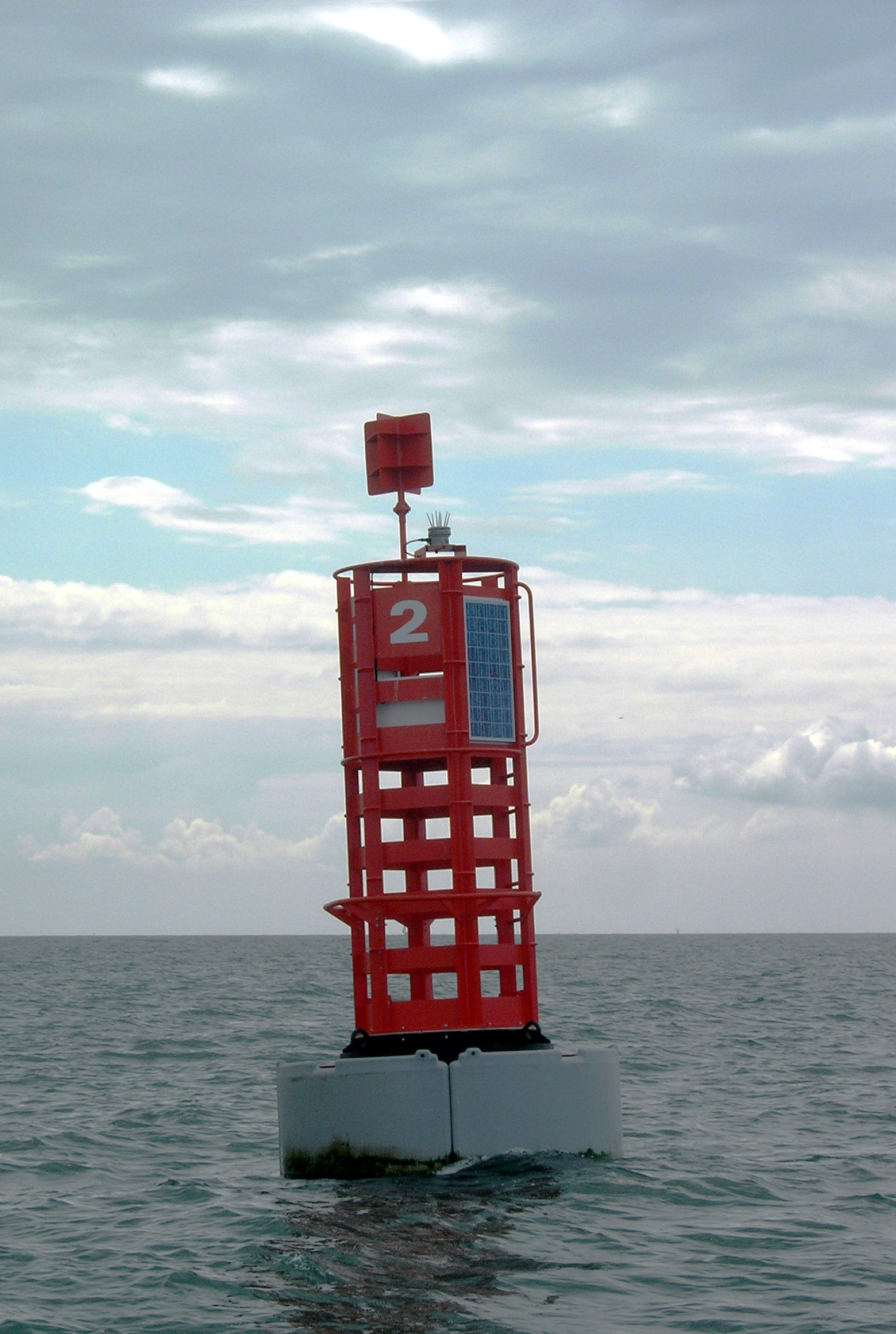 Bouée modulaire latérale babord du chenal d'accés de la Loire